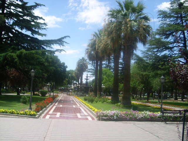 Plaza de Maipú. Vista de la fuente